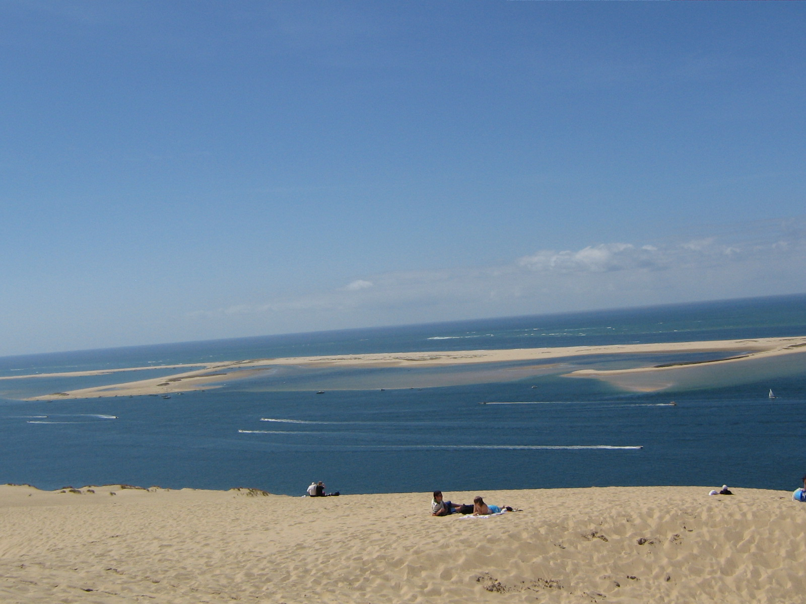 Le banc d'Arguin vu de la dune du Pyla